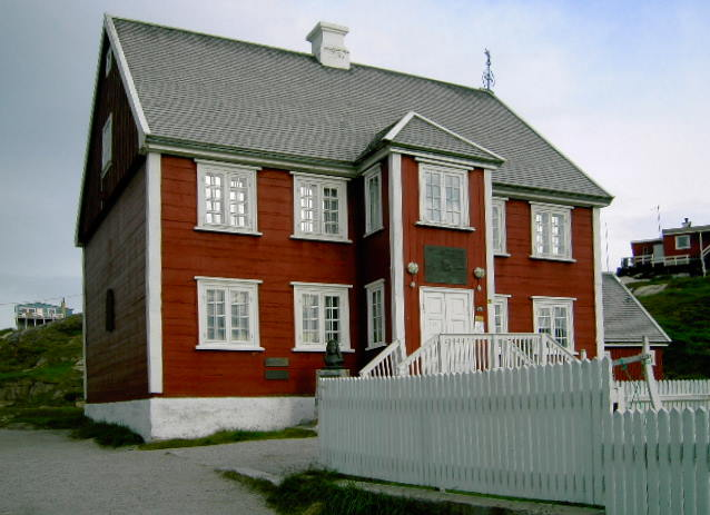 Geburtshaus von Knud Rasmussen in Ilulissat, GrönlandDansk: Knud Rasmussens fødehjem i Ilulissat, Grønland